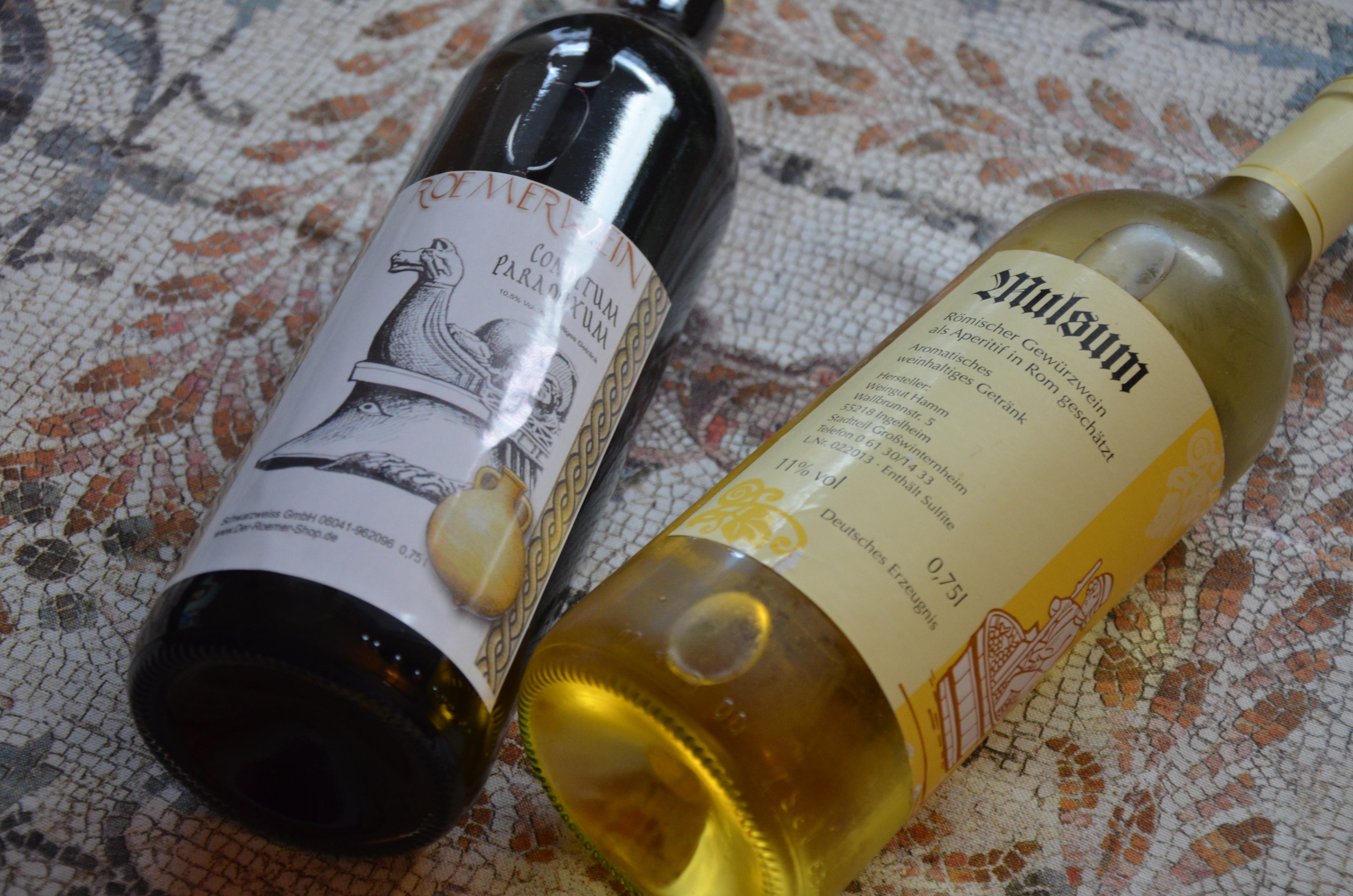 Mulsum and Conditum Paradoxum